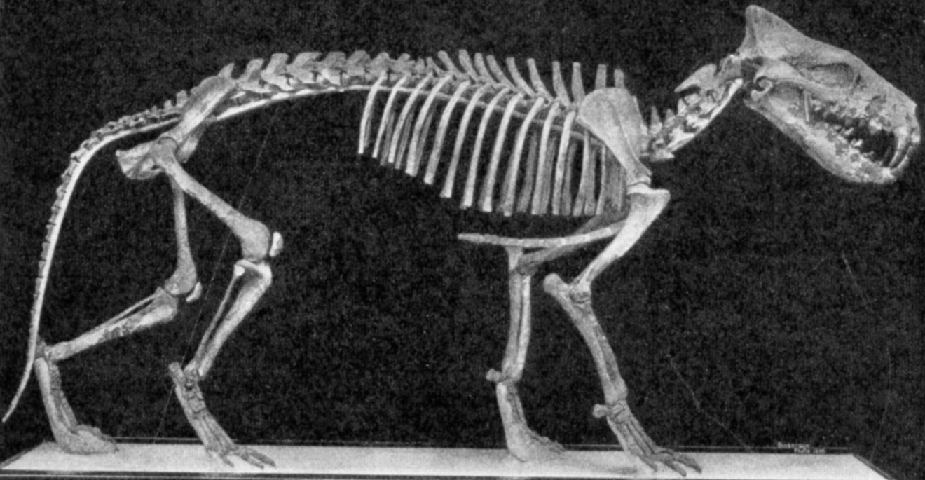 Hyaenodon horridus skeleton.